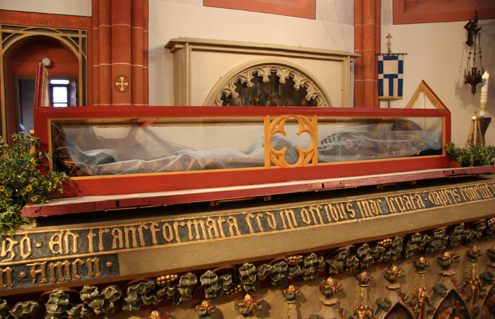 Geöffnete Lade mit den Gebeinen des Heiligen Wendelin während der Festwoche des 650. Jahrestags der Weihe der Wendelinus-Basilika St. Wendel.